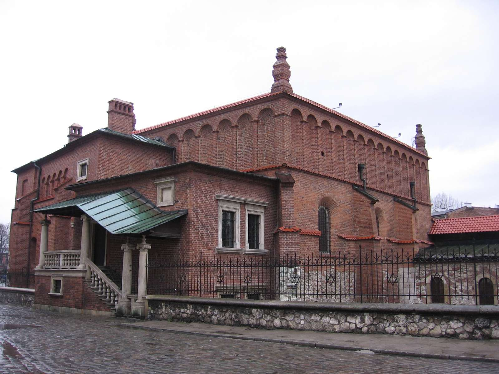 Synagoga Stara w Krakowie Author: Wikipedysta:Birczanin